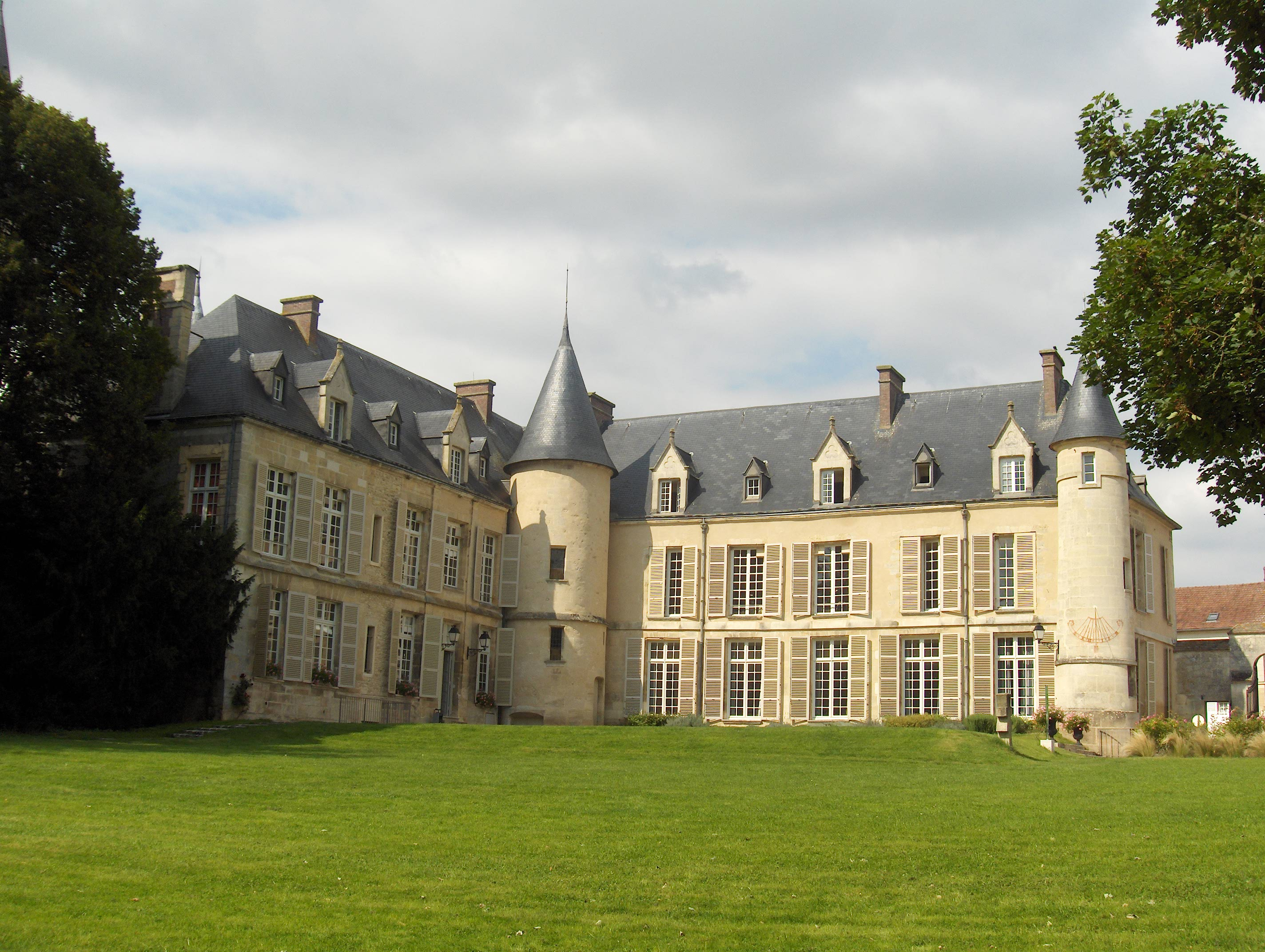 Maison du Parc naturel régional du Vexin français à Théméricourt (Val-d'Oise)